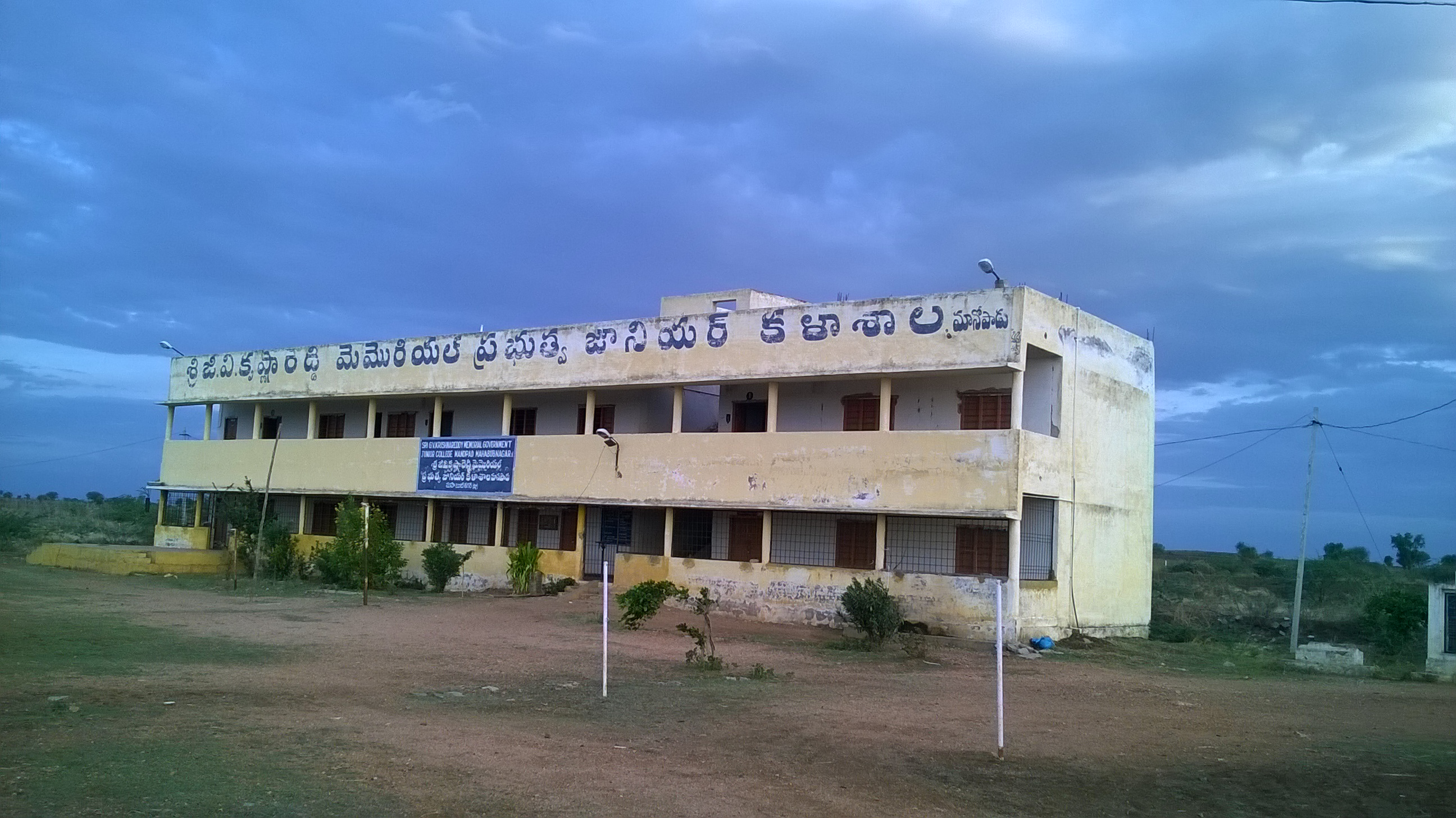 జివికె రెడ్డి స్మారక ప్రభుత్వ జూనియర్ కళాశాల, మానోపాడు